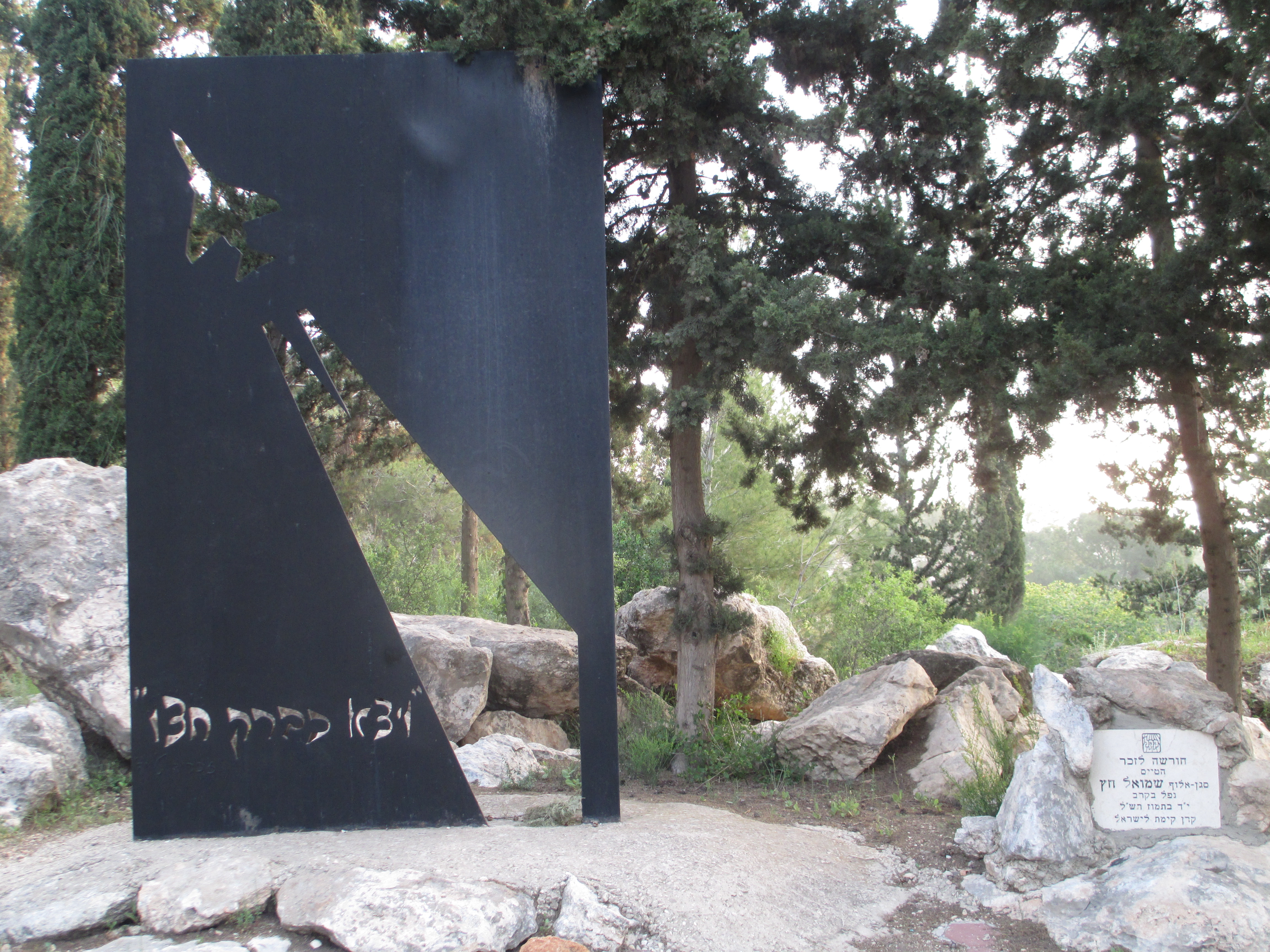 אנדרטה ביער בן שמן לטייס חיל האוויר סא"ל שמואל חץ שנהרג כשמטוסו הופל ליד תעלת סואץ ב-18/7/70